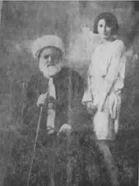 الشاعر العراقي عبد المحسن الكاظمي مع ابنته رباب في مصر قبل وفاته عام 1934